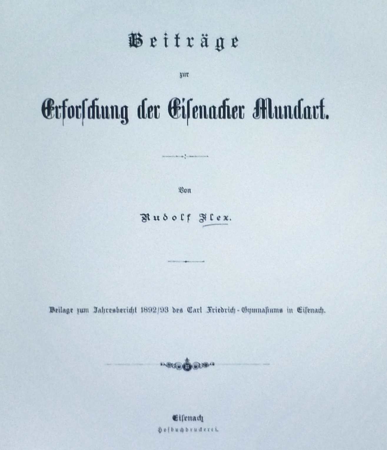 Rudolf Flex: Beiträge zur Erforschung der Eisenacher Mundart (1892/93), Hofbuchdruckerei Eisenach